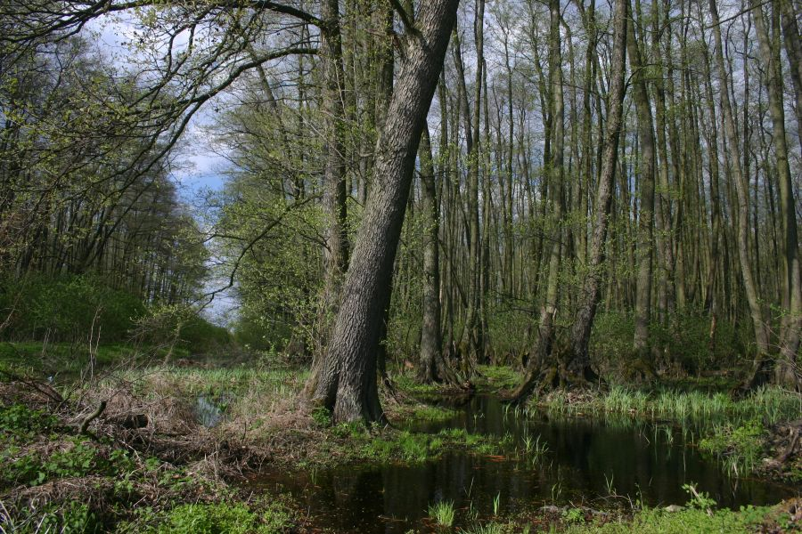 Csíkos éger a Hanságban, Kapuvár